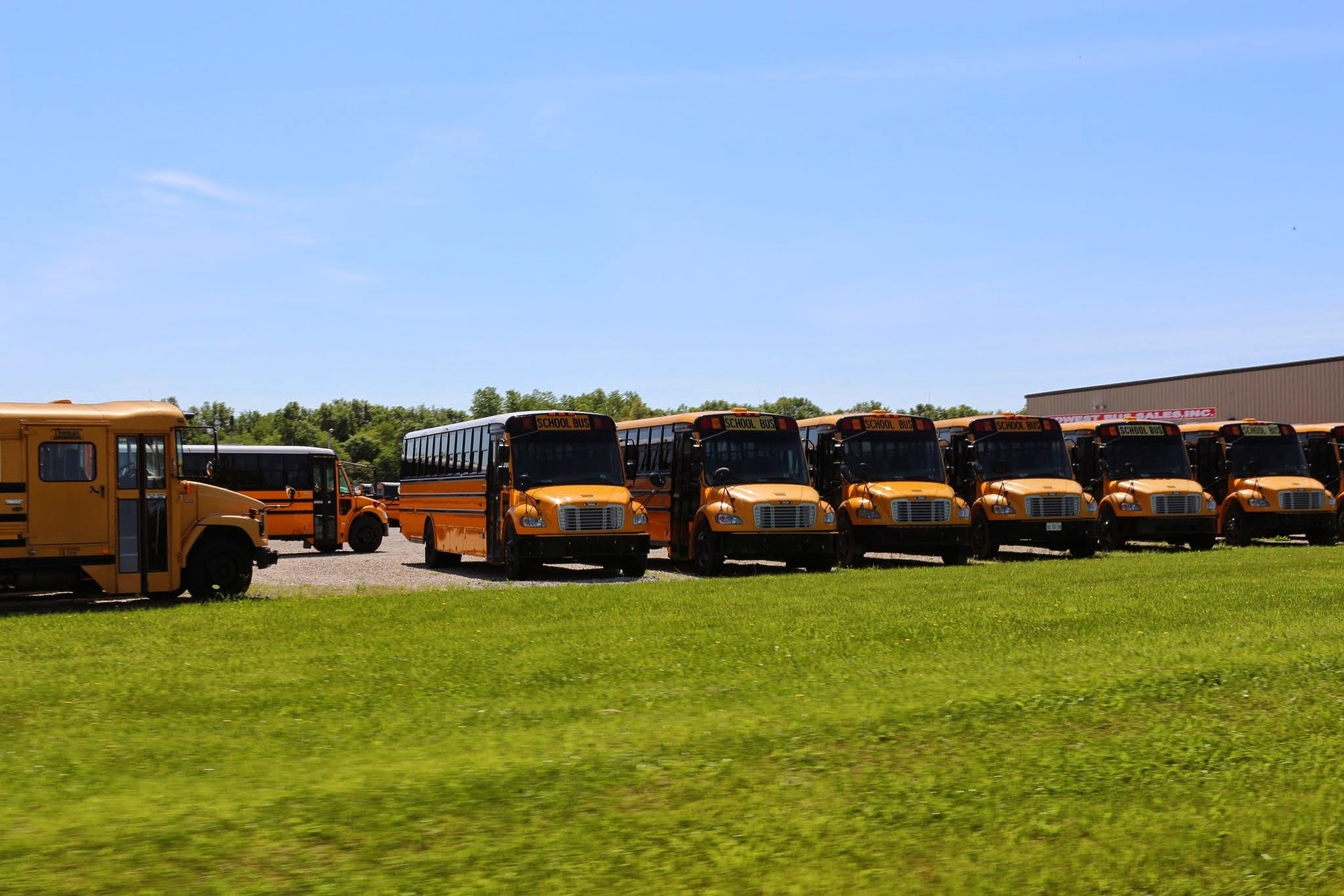 Eine US-amerikanische Schulbus-Flotte der typischen, gelben Schulbusse.